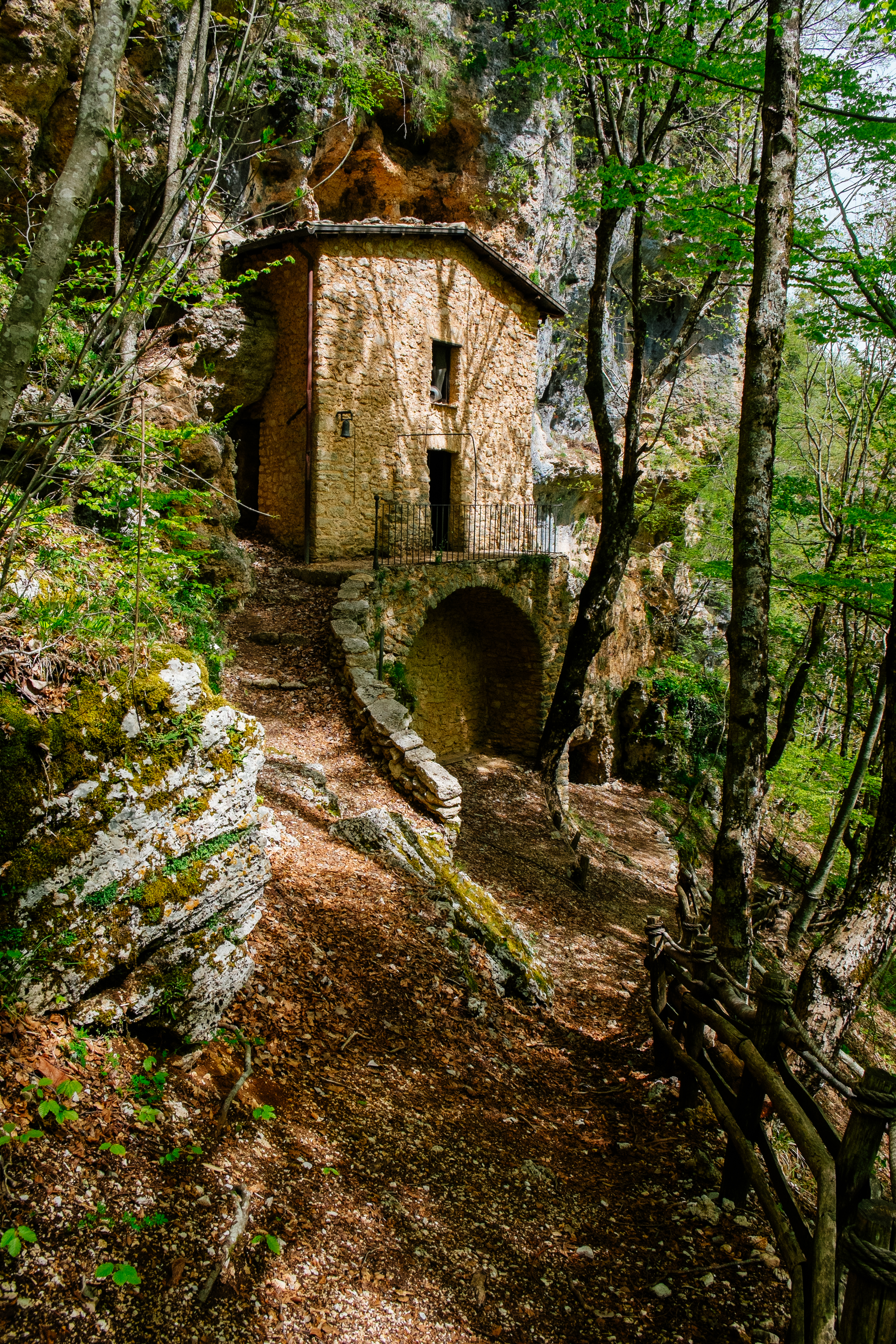 Eremo del Cauto